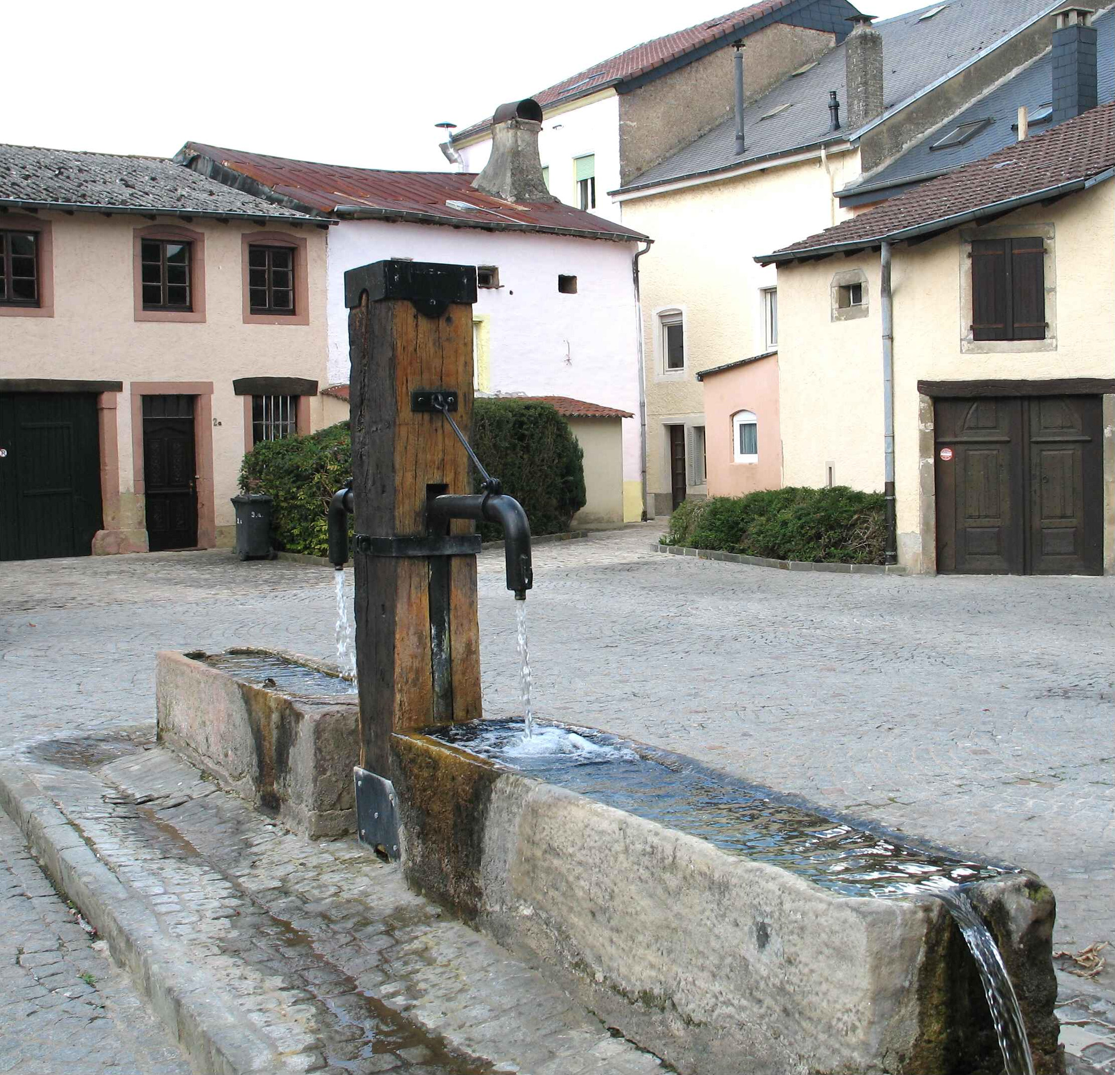 Sujet: Buer op der Plaz bei der Kierch zu Wellesteen Auteur: Eege Foto User:Johnny Chicago Lizenz